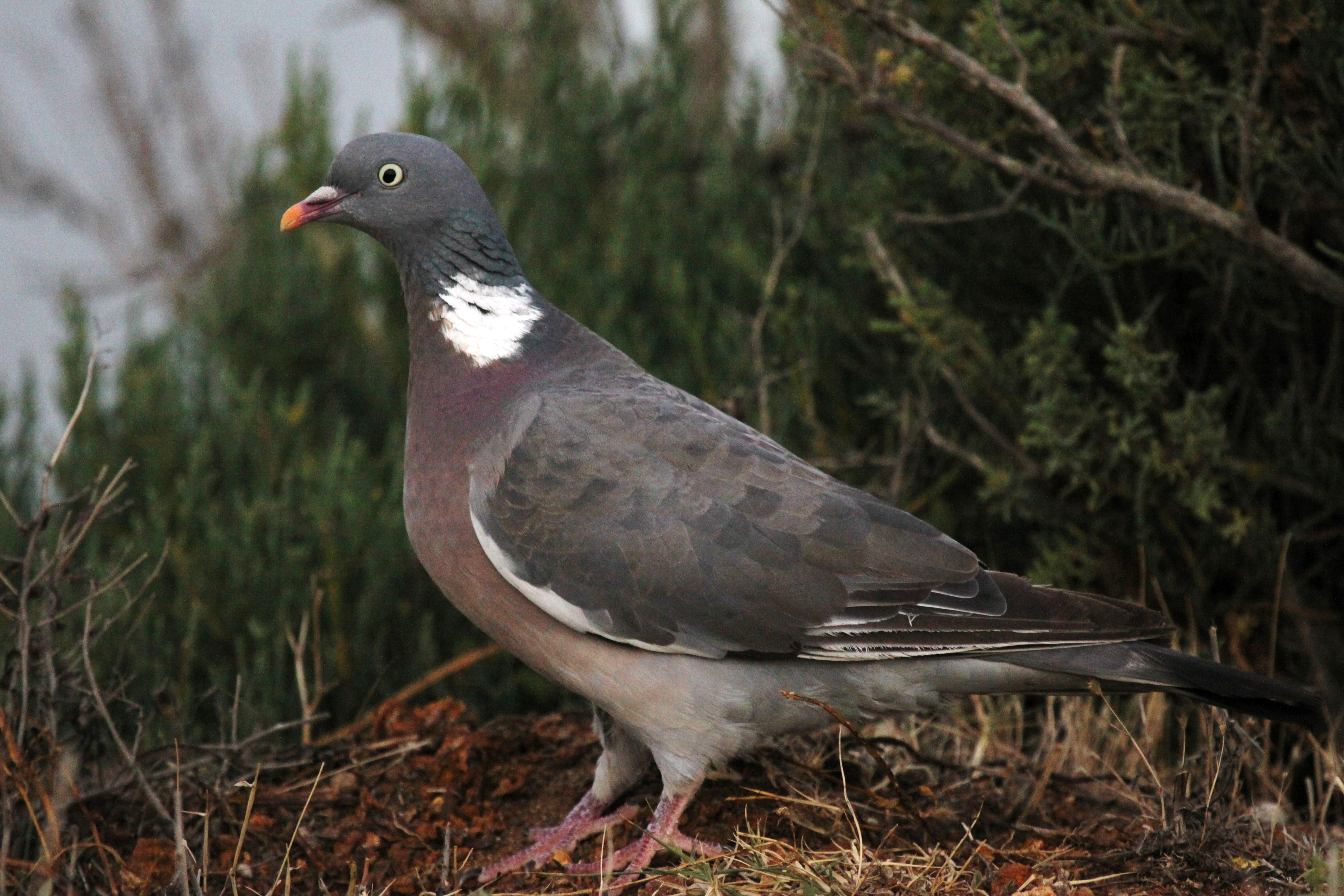 Le soir, un pigeon ramier (Columba palumbus) appelé aussi palombe au bord d' un vasais (bassin) dans les marais salants des Moines à Ars-en-Ré. Ars-en-Ré, Île de Ré, Charente Maritime, France.